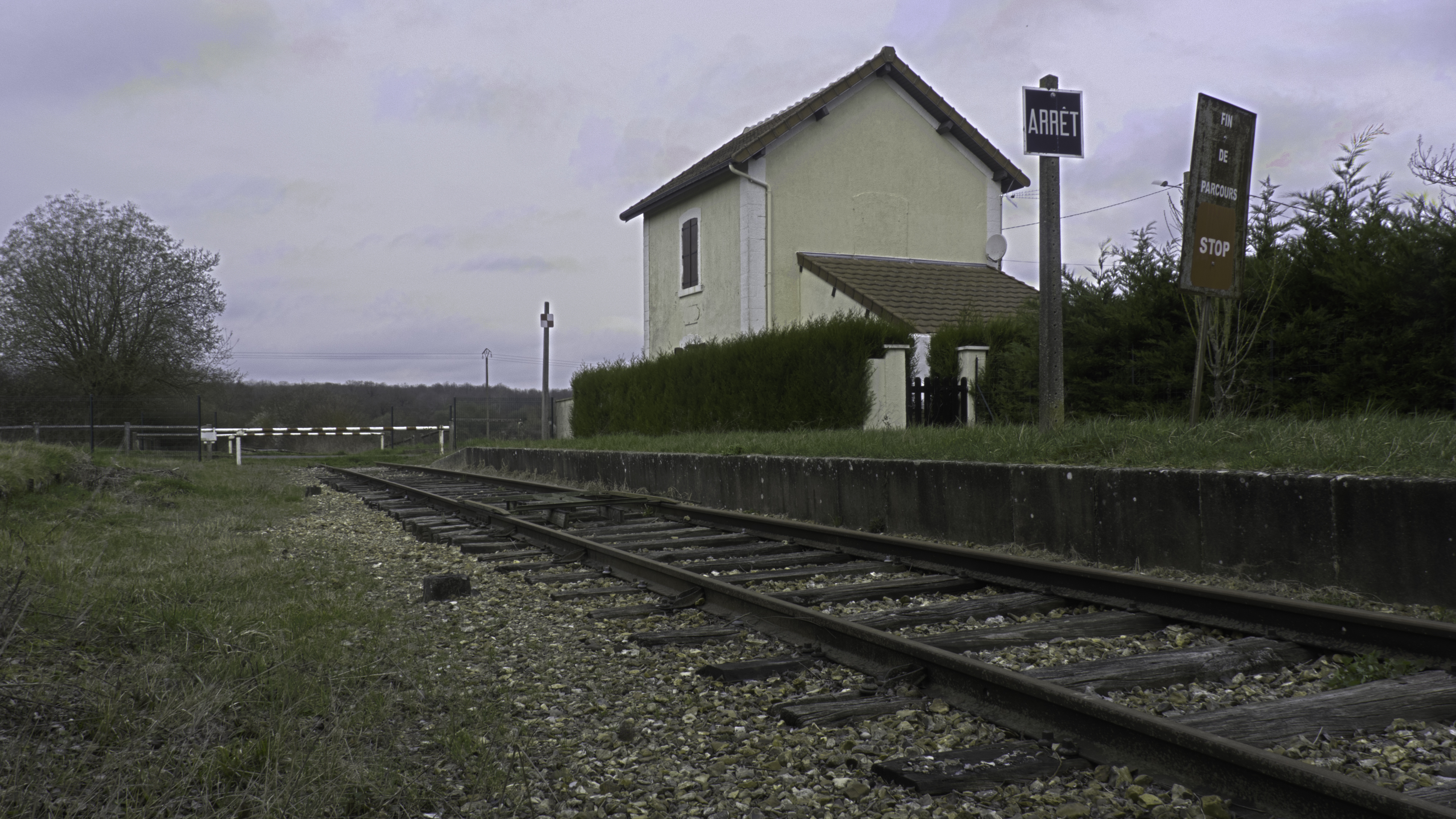 Gare de Neuvy